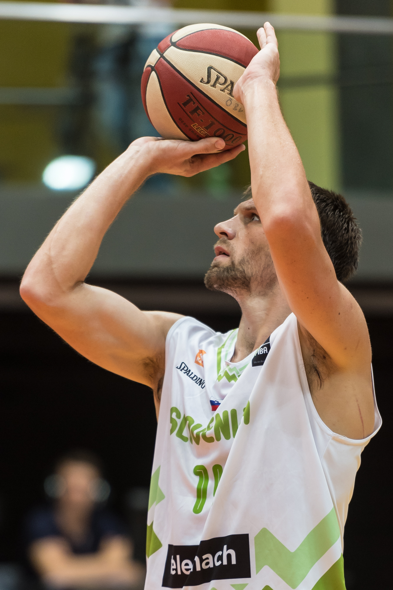 ÖBV Vier-Nationen-Turnier vom 12.-14. August 2016 in Schwechat: Slowenien vs Polen. Bild zeigt Gasper Vidmar (SLO).